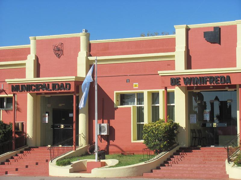 Municipalidad de Winifreda, Provincia de La Pampa, Argentina.